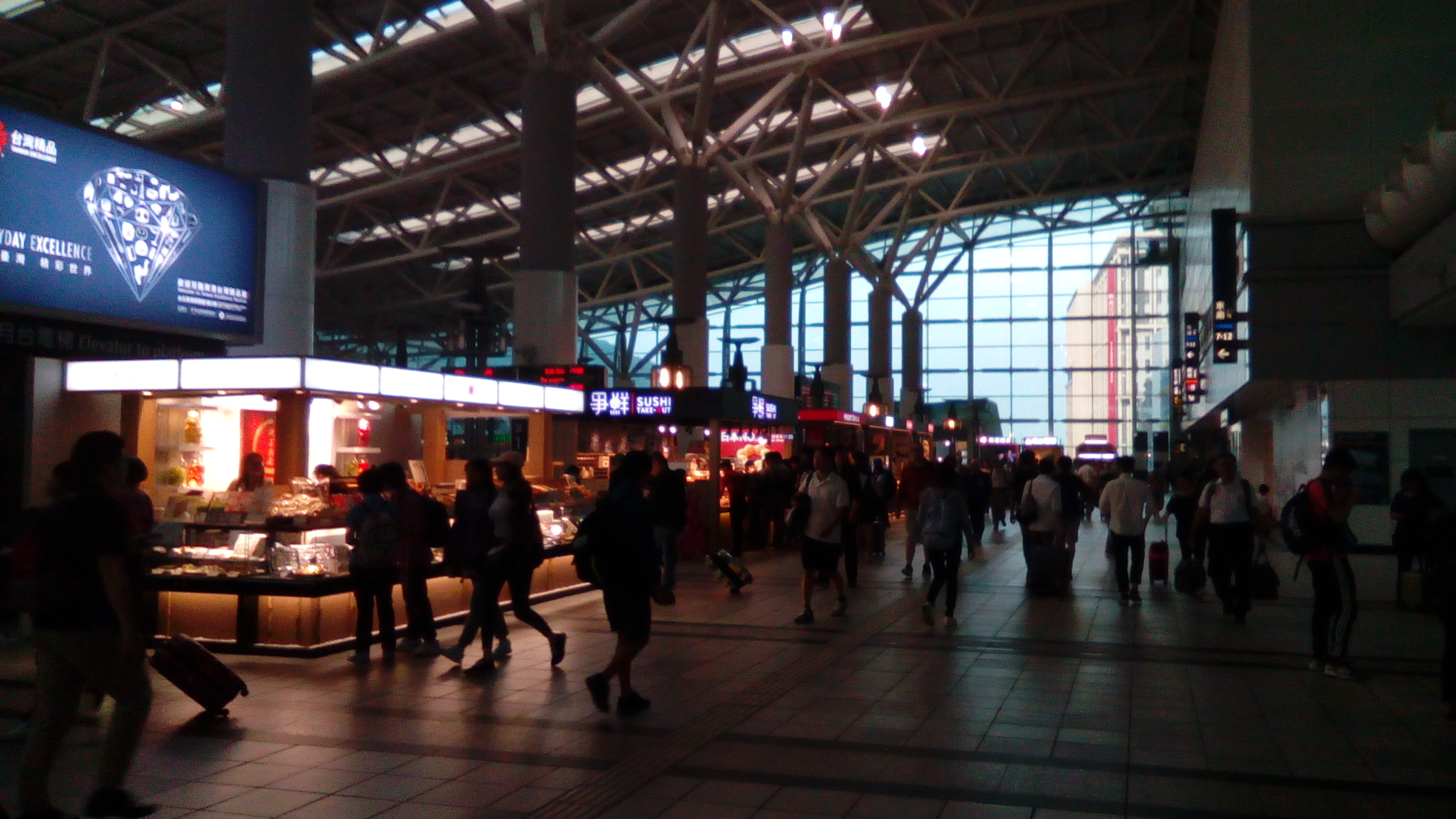 高鐵左營站 台鐵新左營站及捷運左營站的共構